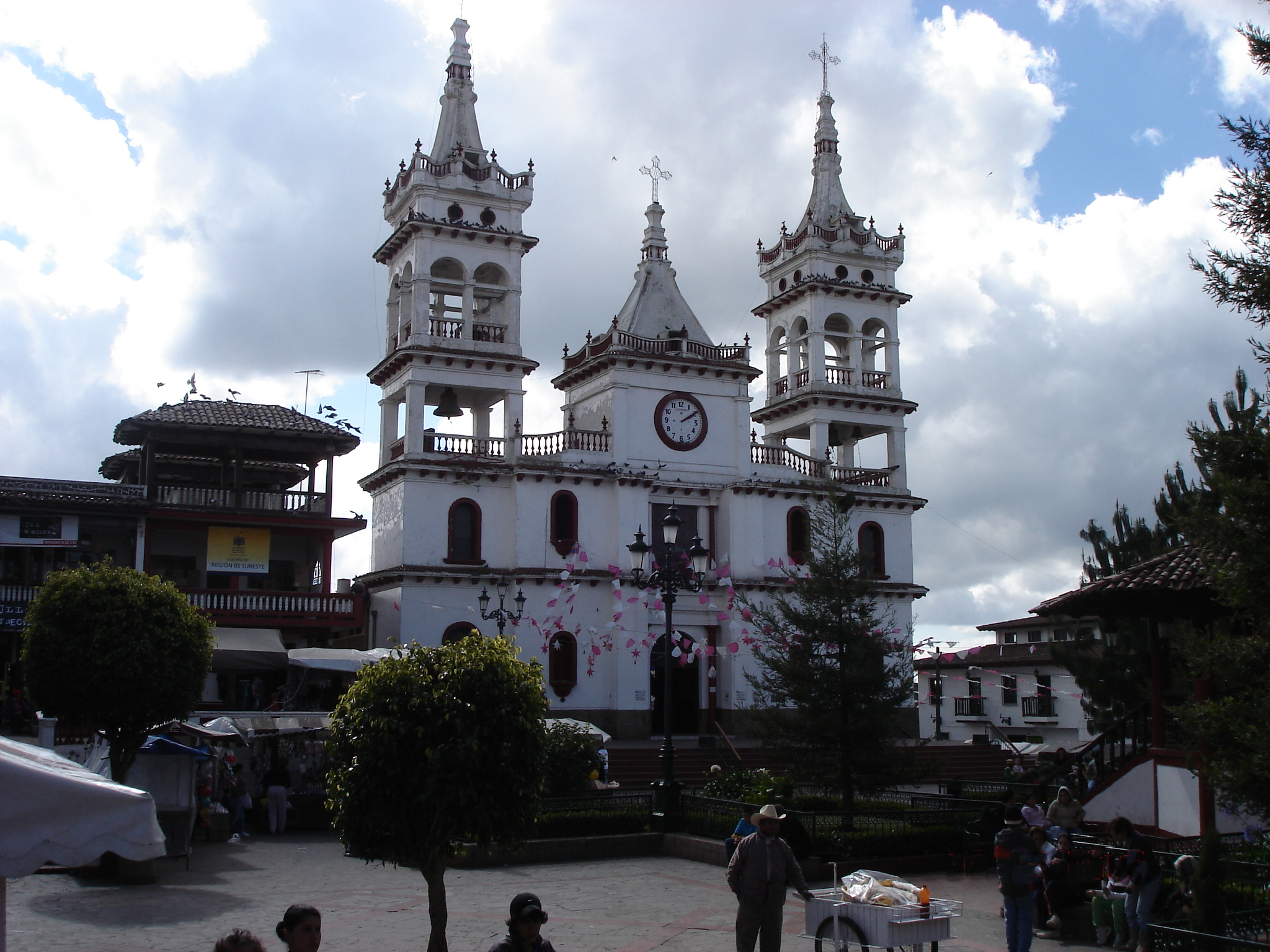 Templo de Mazamitla, y un plaza — en Mazamitla, estado de Jalisco, México.